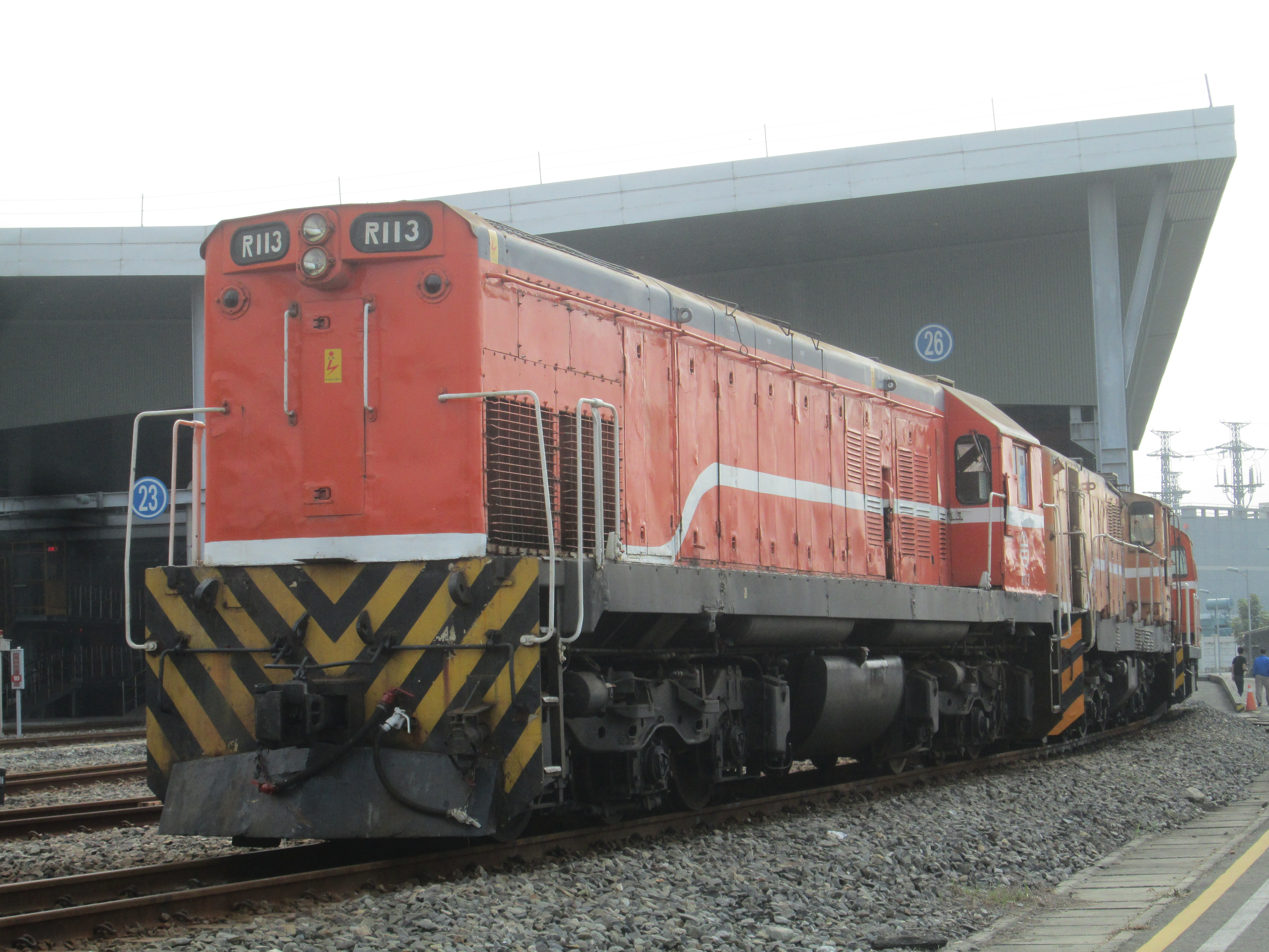 臺灣鐵路管理局柴電機車R113於潮州基地。